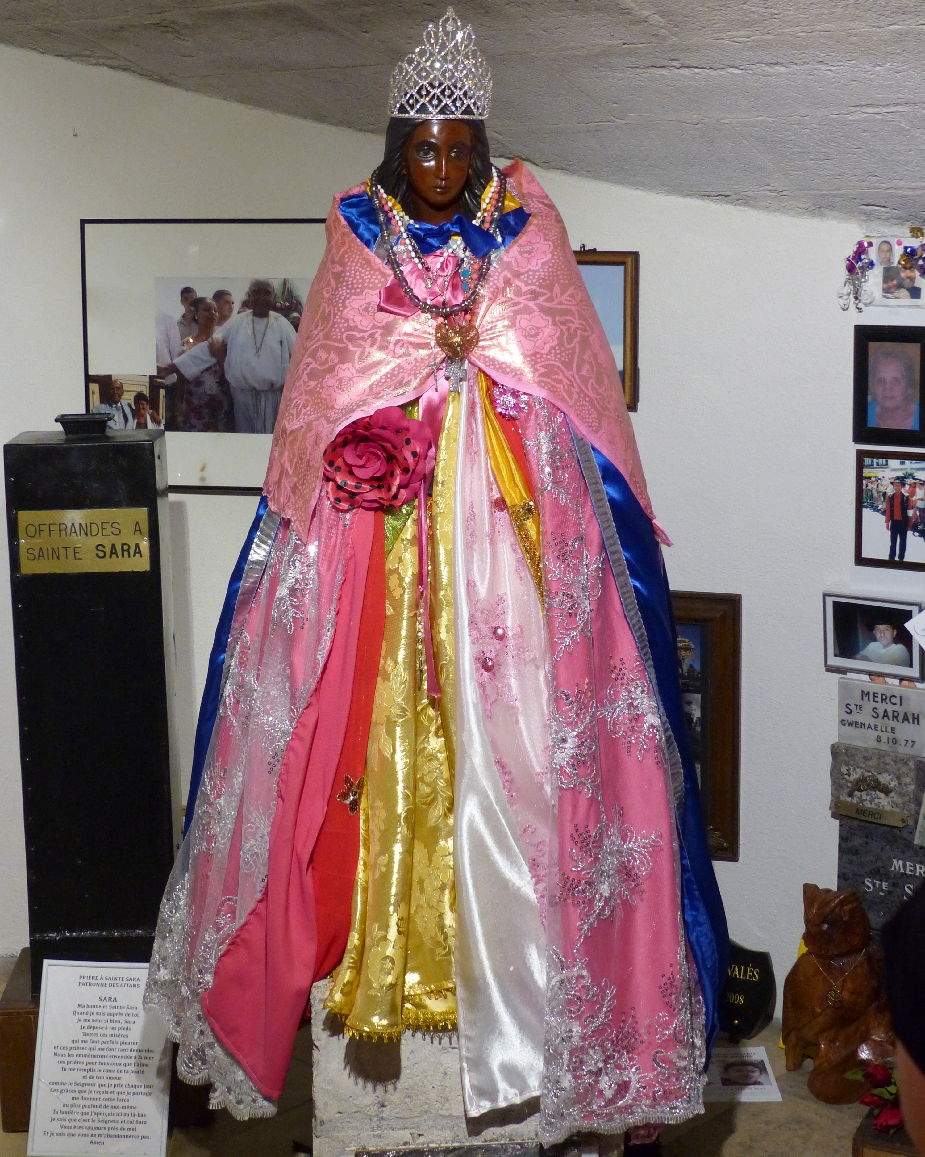 Saintes-Maries-de-la-Mer (Bouches-du-Rhône, France), église Notre-Dame-de-la-Mer, dont l'intérieur a été intégralement restauré entre le 1er septembre 2015 et le 30 avril 2016.